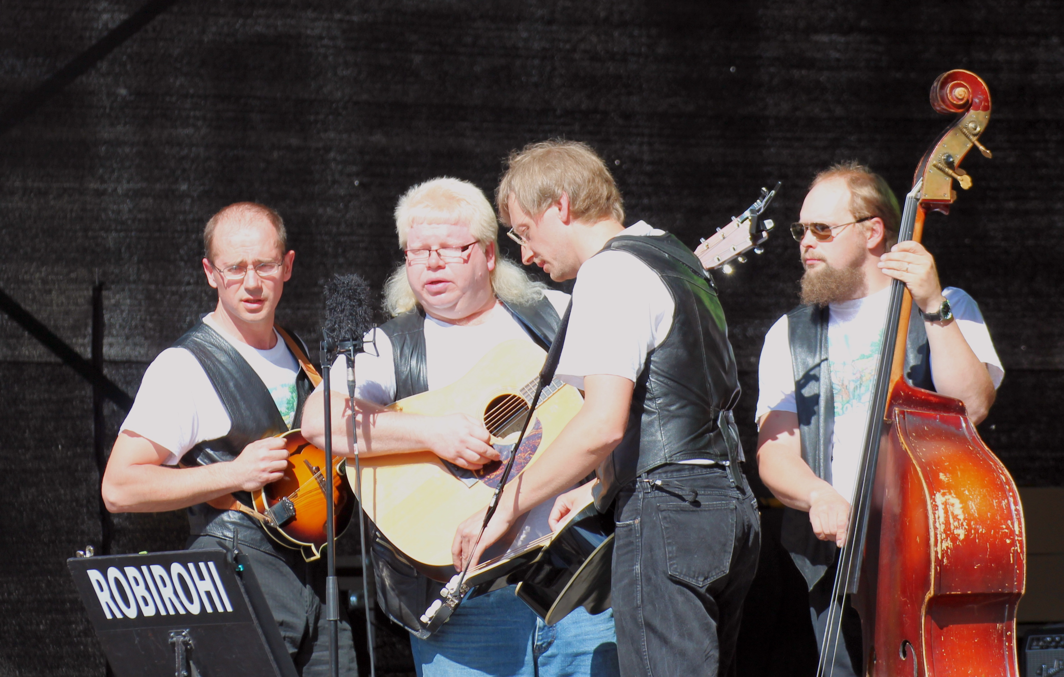 Ansambel Robirohi esinemas Vanalinna päevadel Tallinnas Raekoja platsil.